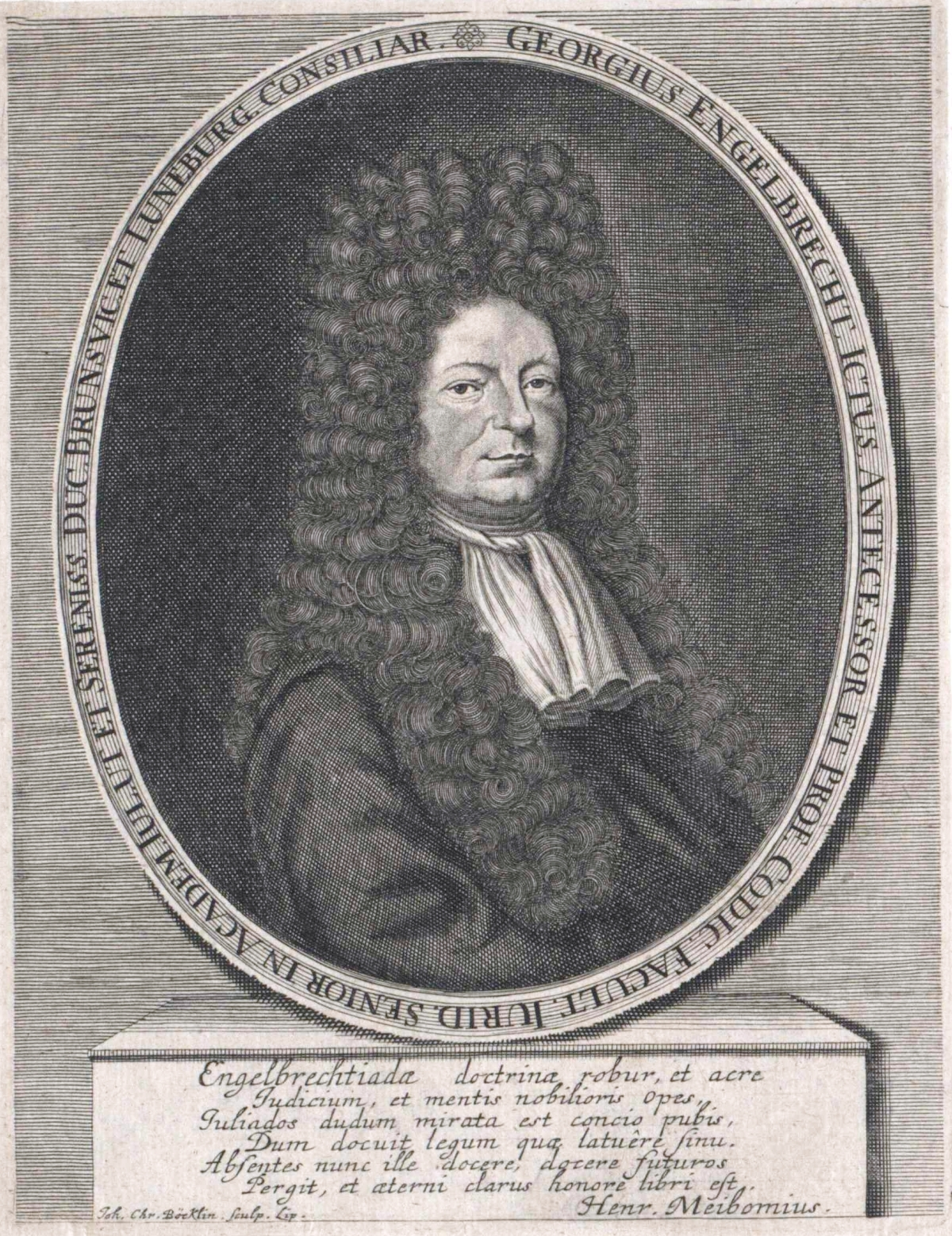 Georg Engelbrecht der Ältere (1638–1705), Professor an der Universität Helmstedt.